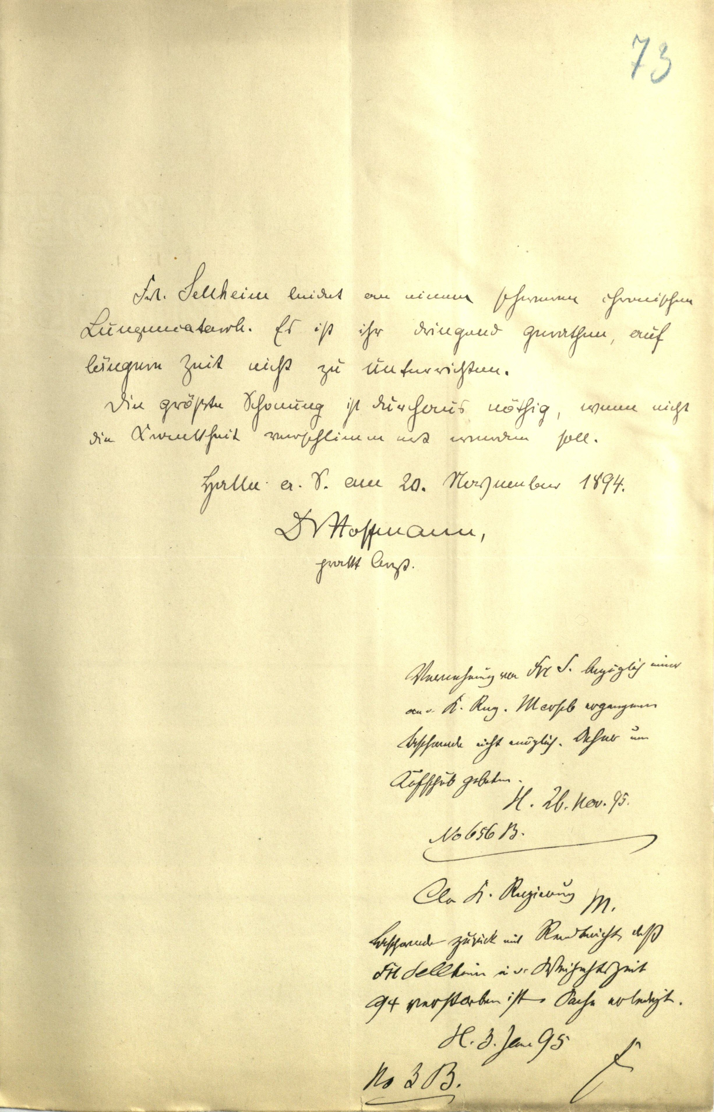 A 2.36 Nr. 13 073 Gutachten zu Sellheim 03.01.1895 verstorben